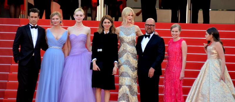 Colin Farrell, Kirsten Dunst, Elle Fanning, Sofia Coppola, Nicole Kidman, Youree Henley, Angourie Rice et Addison Riecke lors de la présentation du film "Les Proies" au festival de Cannes